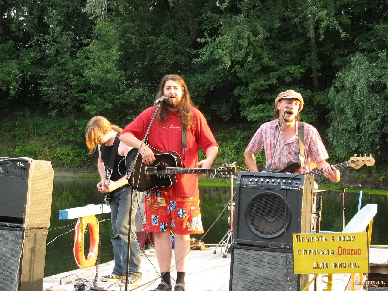 Небослов в Каминном зале "ЦДРИ" в 2007 году.